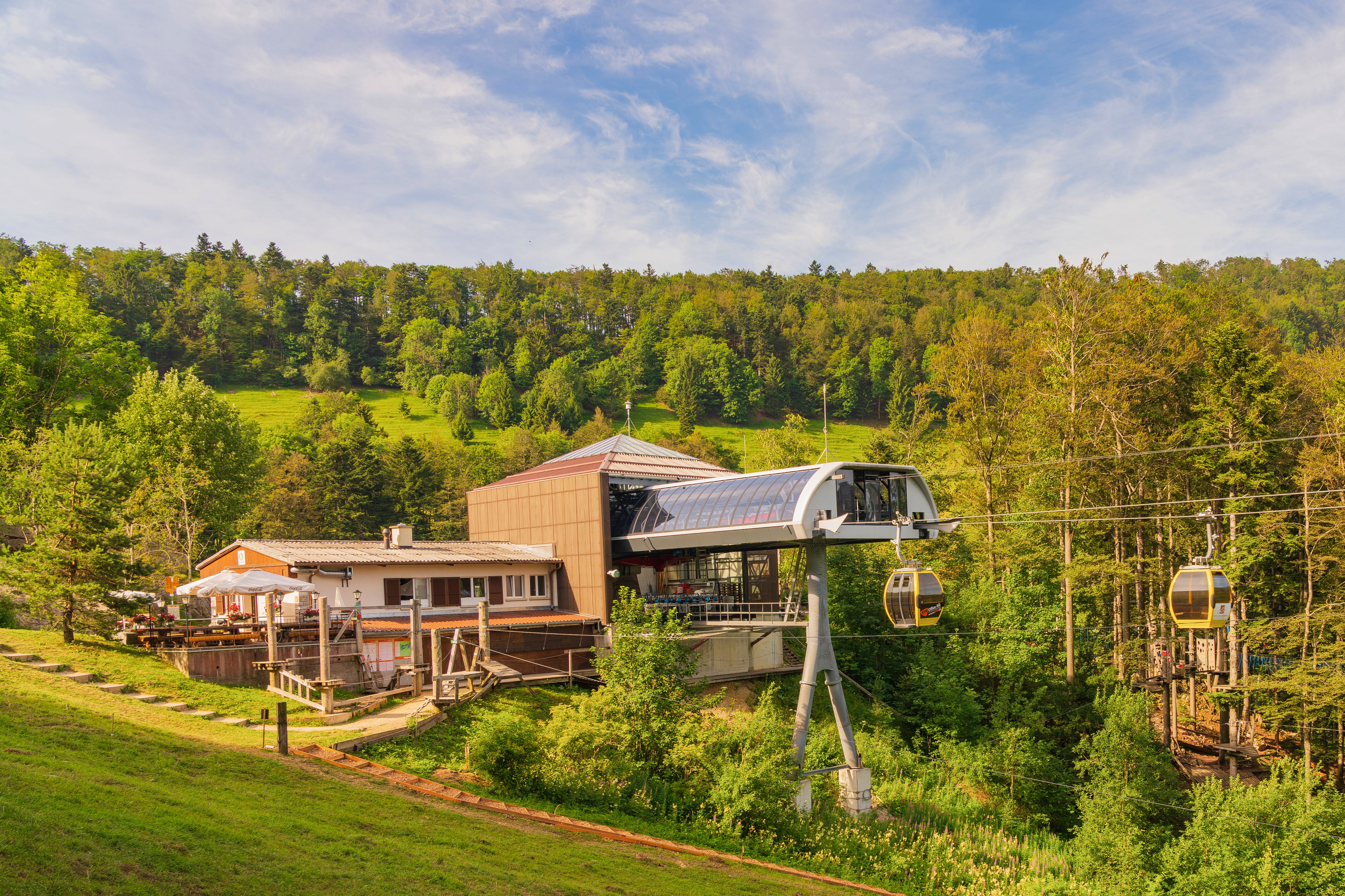 Wasserfallenbahn Bergstation in Reigoldswil